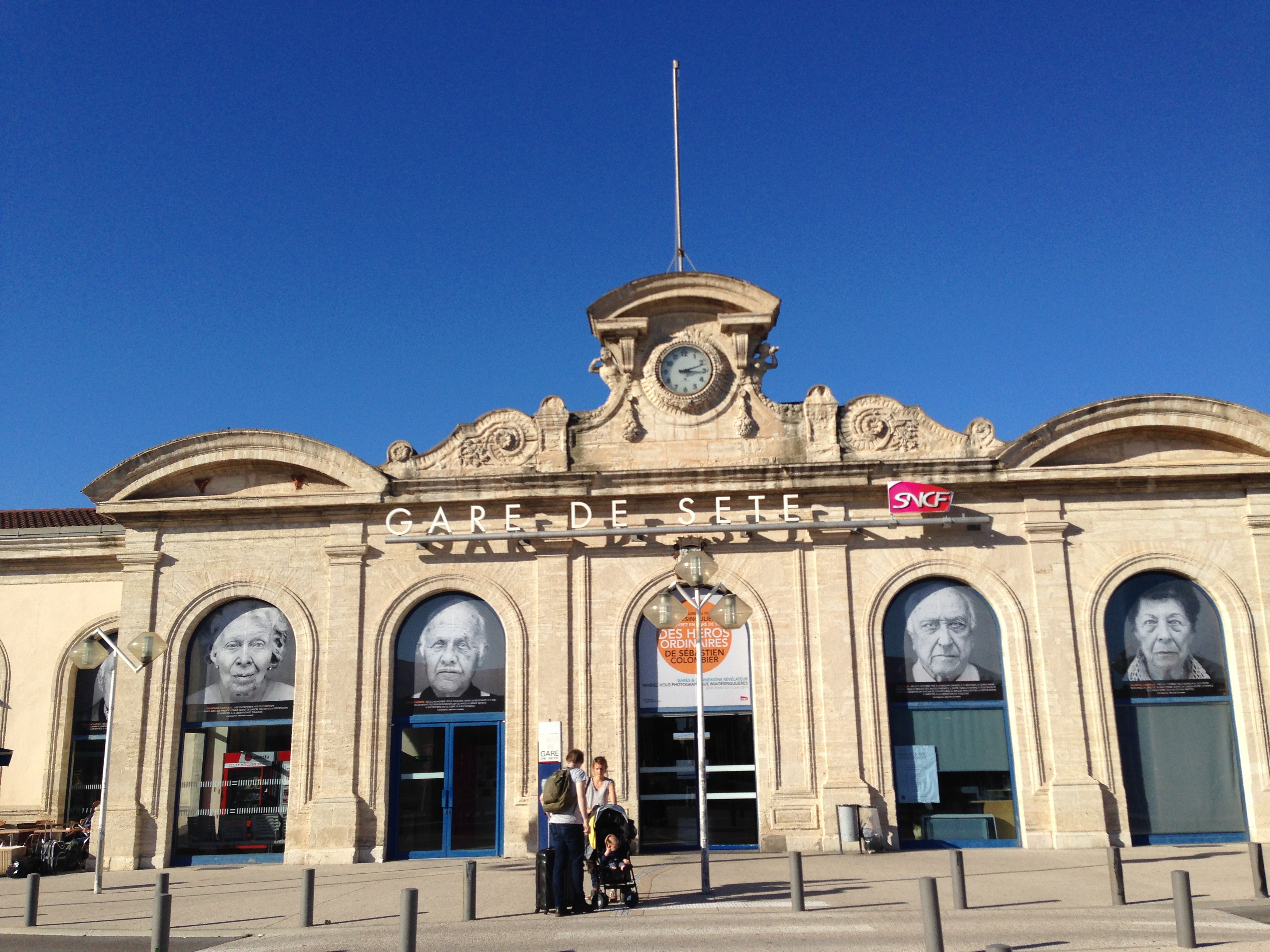 Gare de Sète en octobre 2014